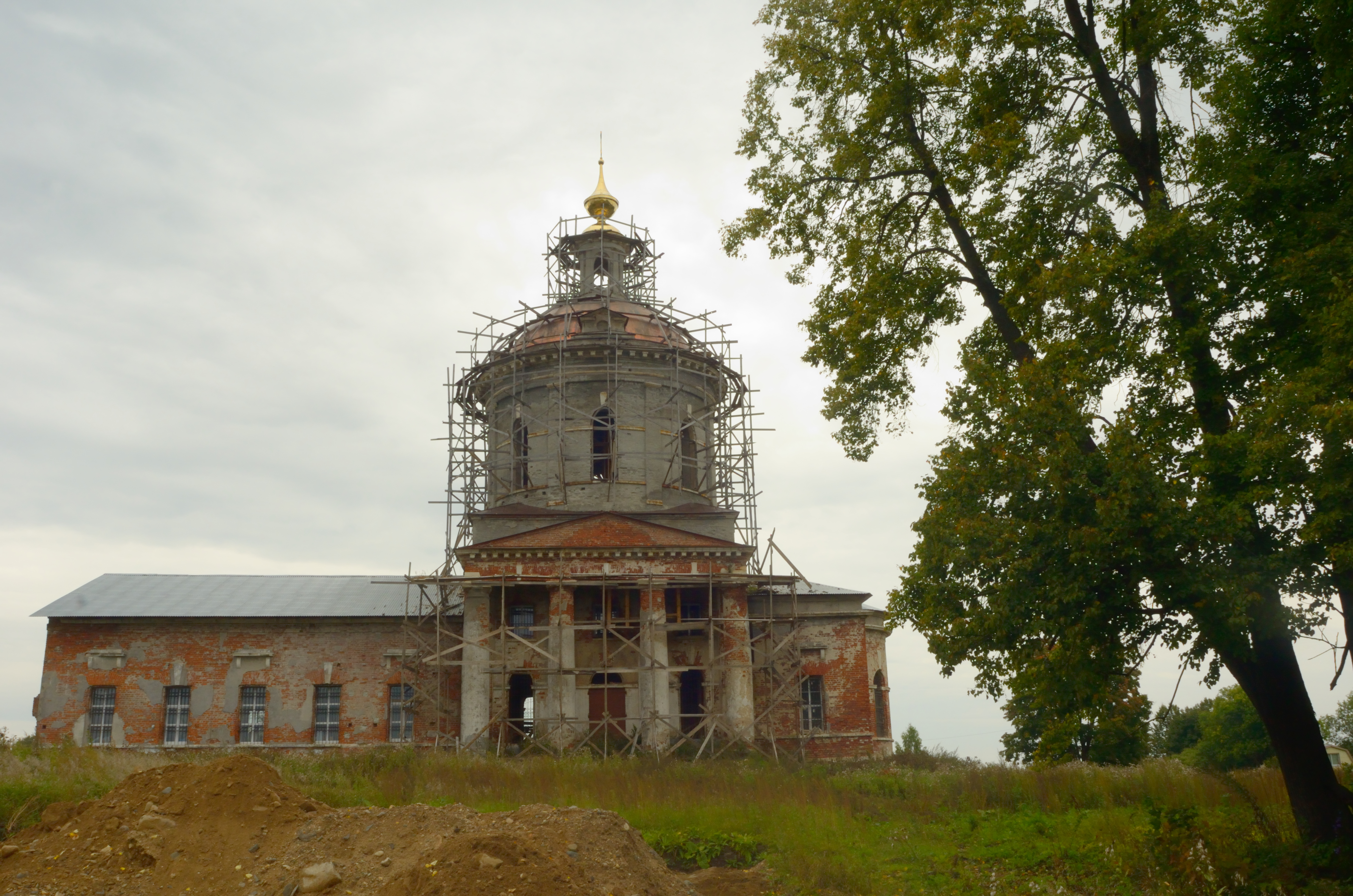 Церковь Петра и Павла, 1830—1836 гг. (Владимирская область, Юрьев-Польский, село Большепетровское)